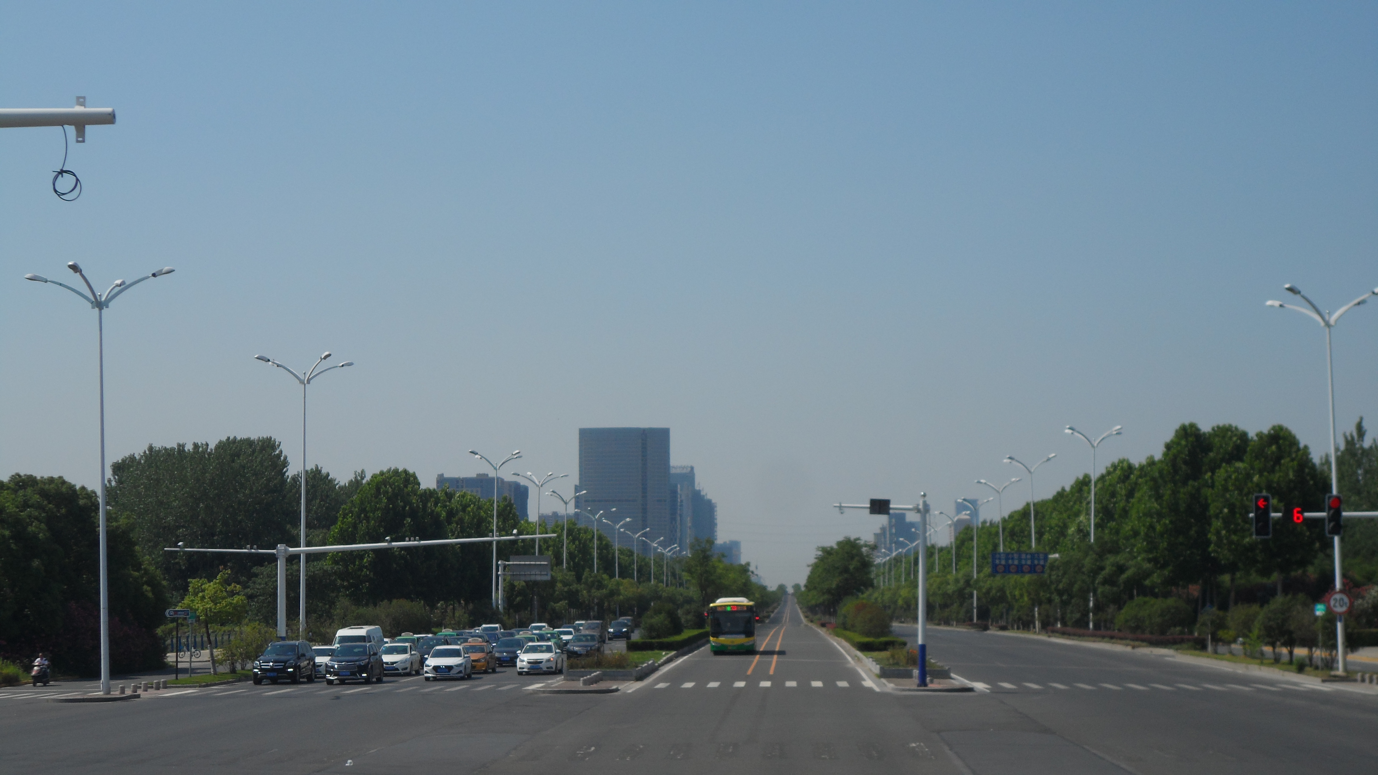 合肥徽州大道